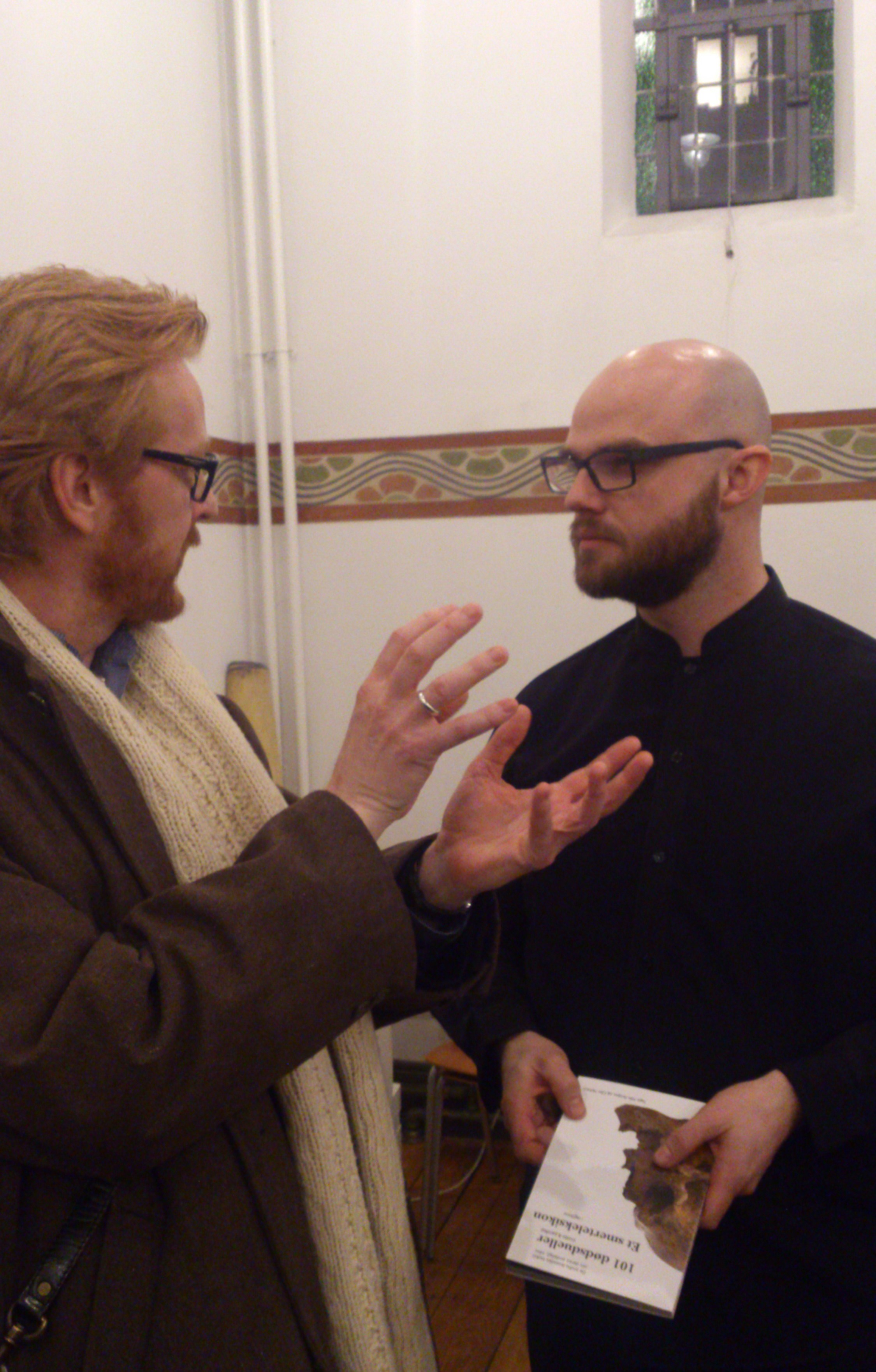 Jens Carl Sanderhoff og Stefán Arason ved urpremieren på Future Requiem, marts 2014.